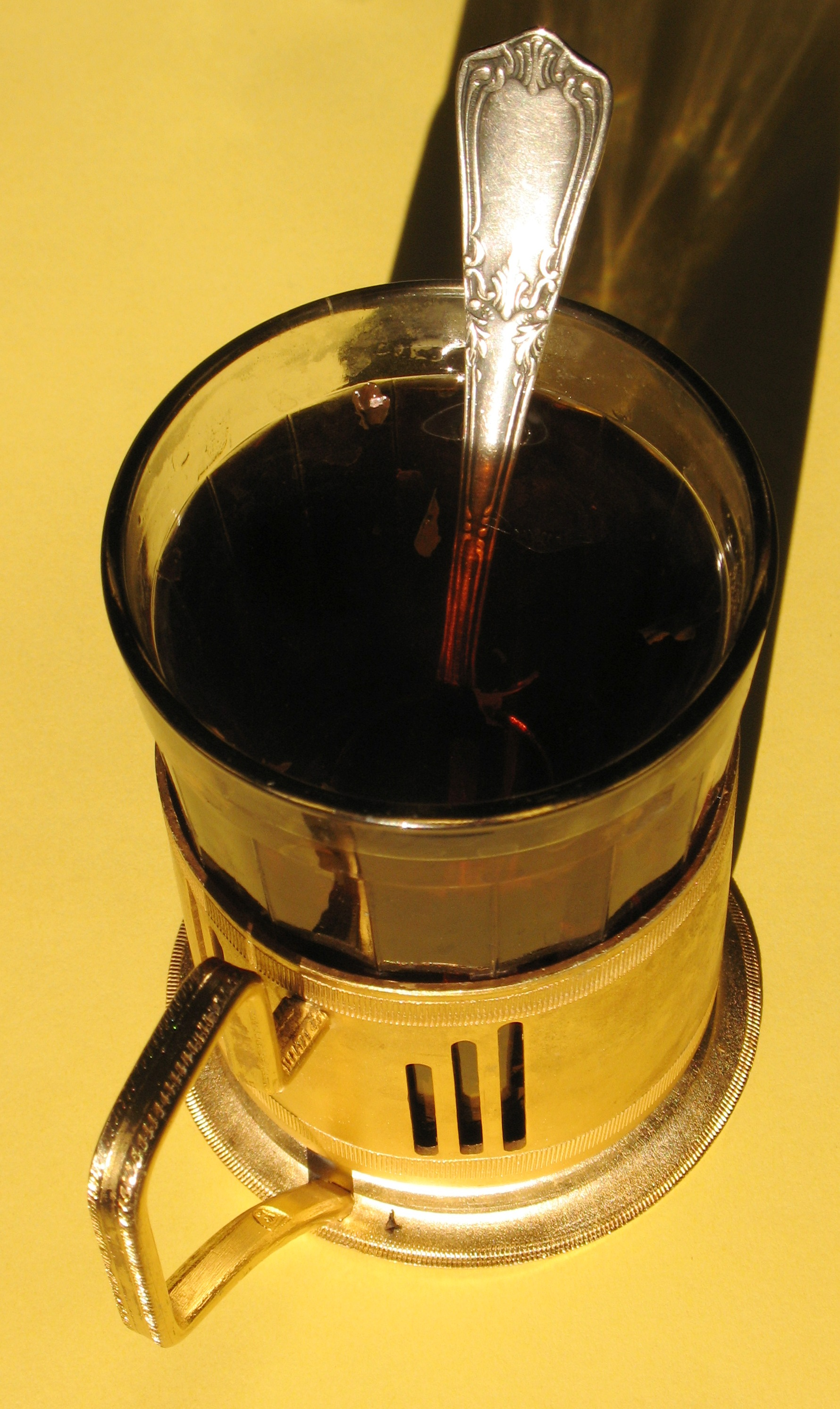 Russian tea in train. Утренний чай в поезде РЖД, освещённый солнцем. Латунный штампованный подстаканник, гранёный стакан, массивная чайная ложечка как теплоотвод.